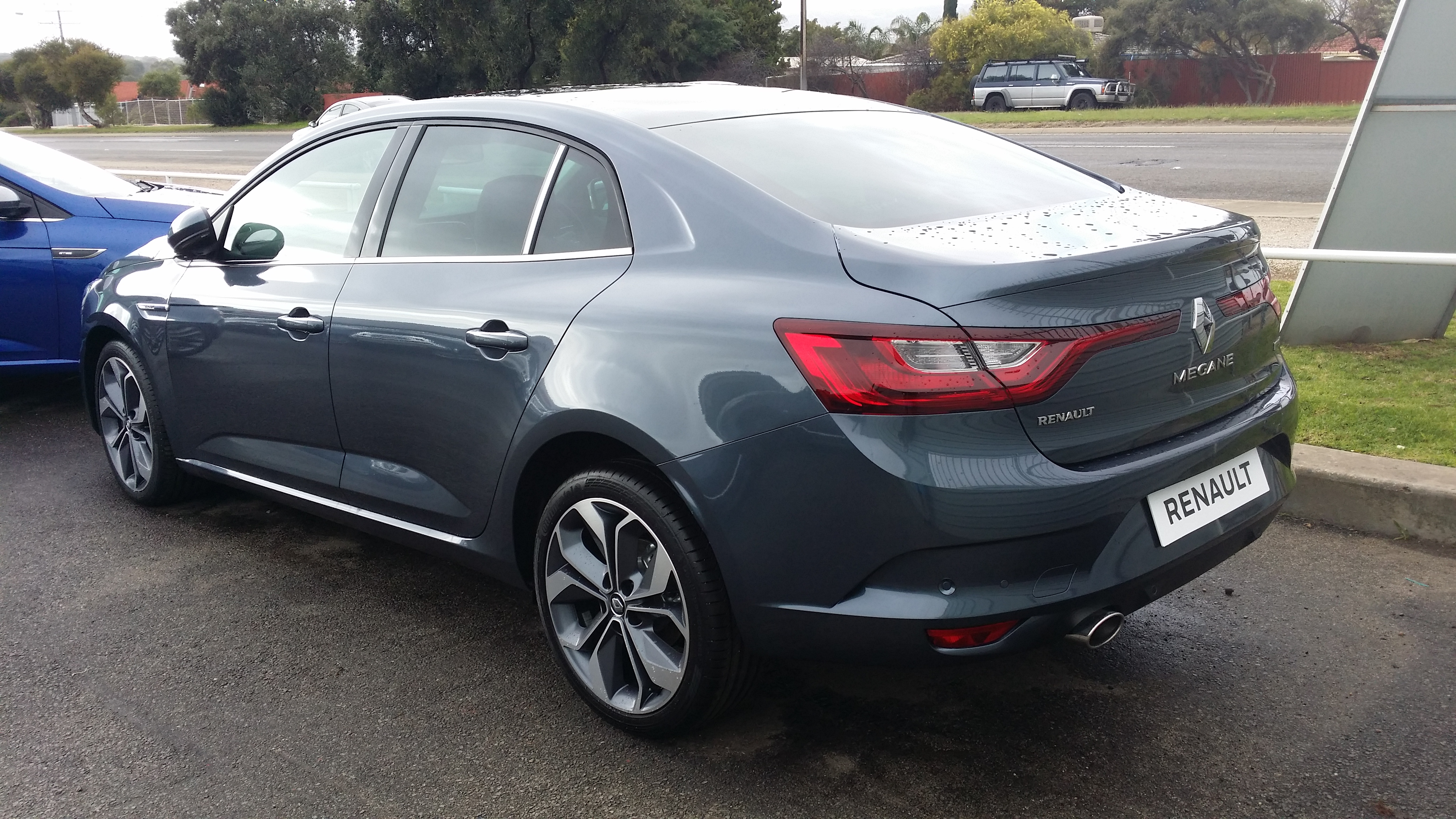 Renault Megane Intens sedan